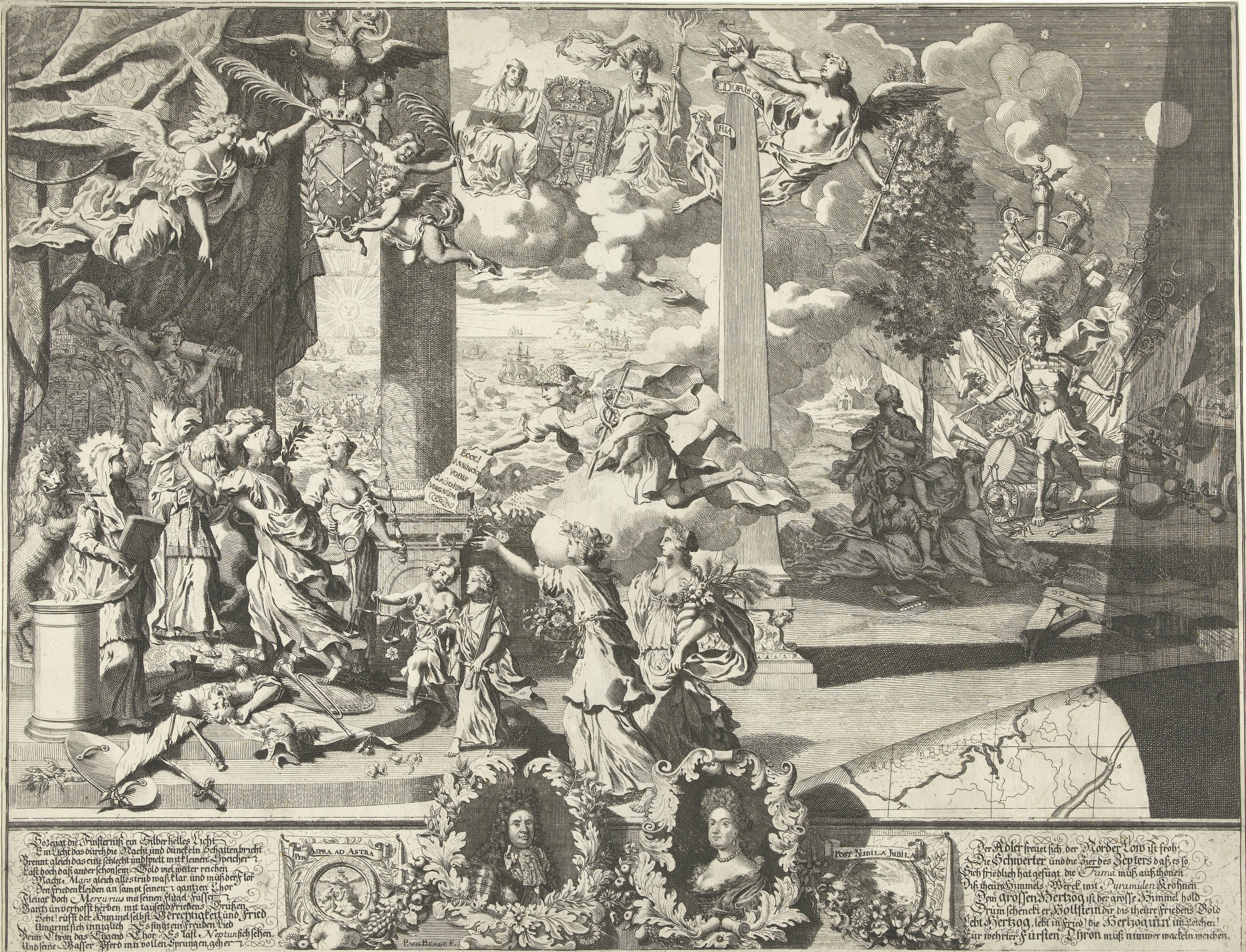 Allegorische voorstelling op het verdrag van Altona uit 1689. Onder portretbustes van Christiaan Albrecht, hertog van Holstein-Gottorp en zijn vrouw Friederike Amalie van Denemarken. In de hemel op een wolk hun wapen. In het midden Mercurius die de bootschap van de vrede brengt. Rechts achter Mars met vakkel en zwaard, achter hem allerlei wapentuig. Op zee is Neptunus met zijn wagen met zeepaarden te zien. Aan weerszijden van de portretten een vers op het verdrag van Altona in het Duits.